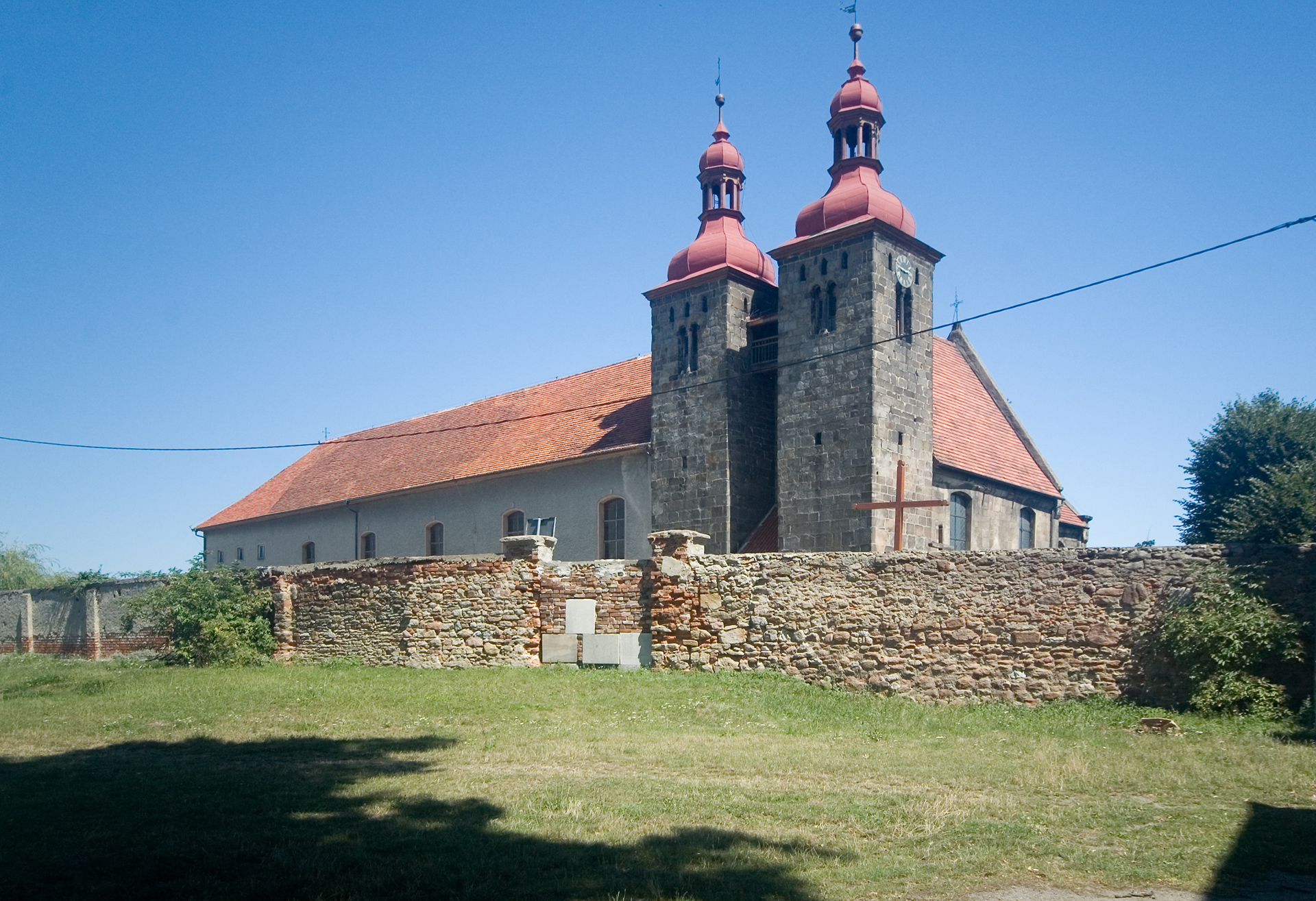 kościół rodowy, klasztorny Cystersów, ob. kościół par. p. w. Wniebowzięcia NMP- klasztor, ob. część korpusu kościoła Wierzbna, Żarów